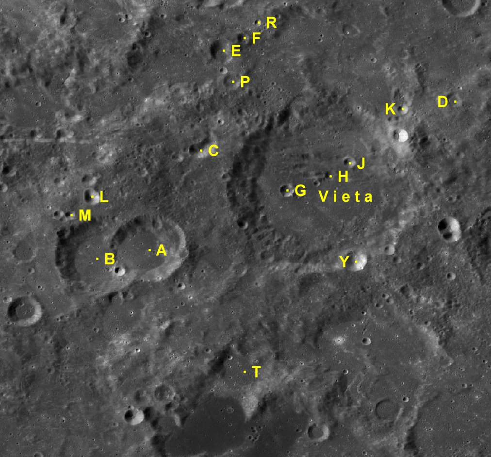 Cráter lunar Vieta. Cráteres satélite. (Imagen LRO)